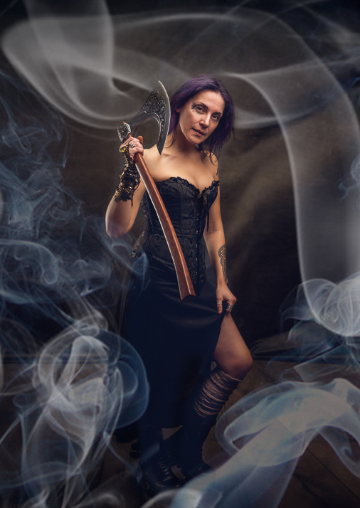 Foto sesión para el Libro Maxic